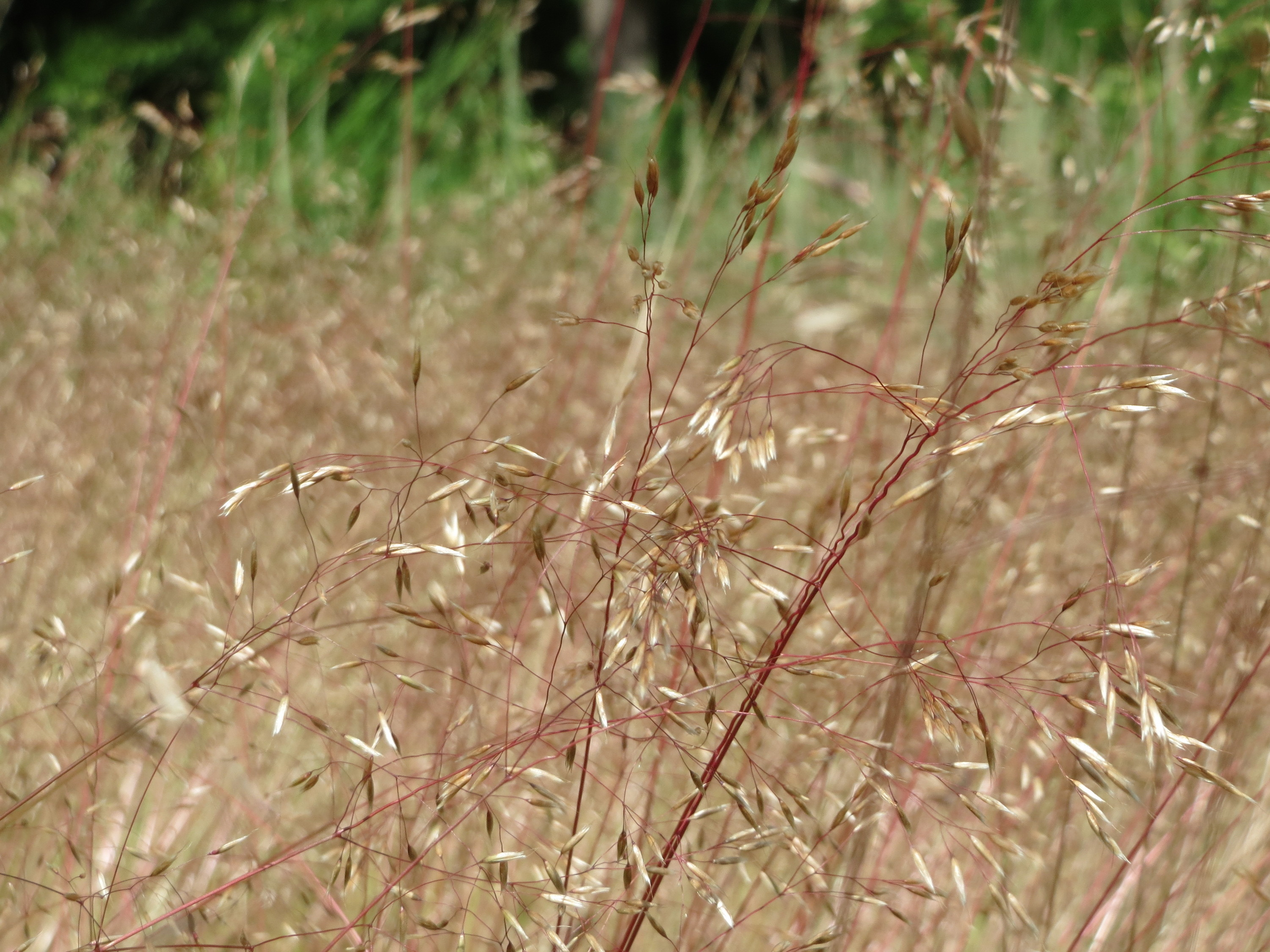 Draht-Schmiele (Avenella flexuosa) im Schwetzinger Hardt